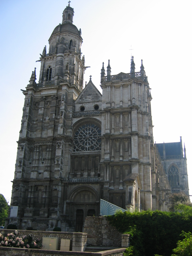 Cathédrale d'Evreux, Eure, Haute-Normandie